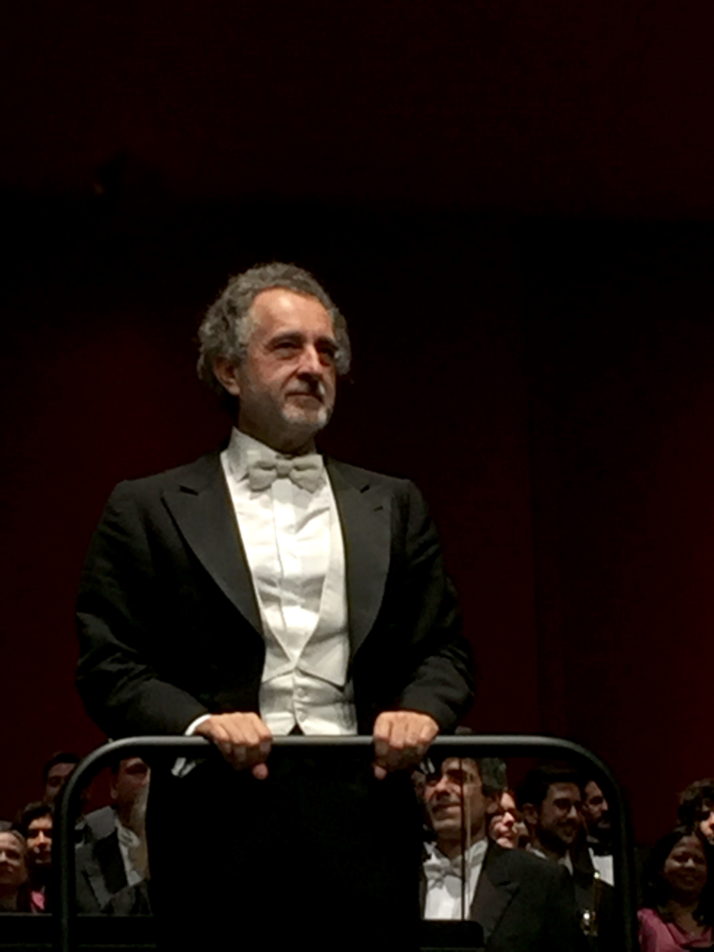 Josep Pons i VIladomat, director musical del Gran Teatre del Liceu, dirigint l'Orquestra i Cor del Liceu al teatre l'Atlàntida de Vic, interpretant el Requiem de Mozart.